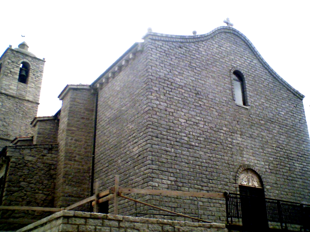 Chiesa di Calangianus, provincia di Olbia-Tempo, Sardegna